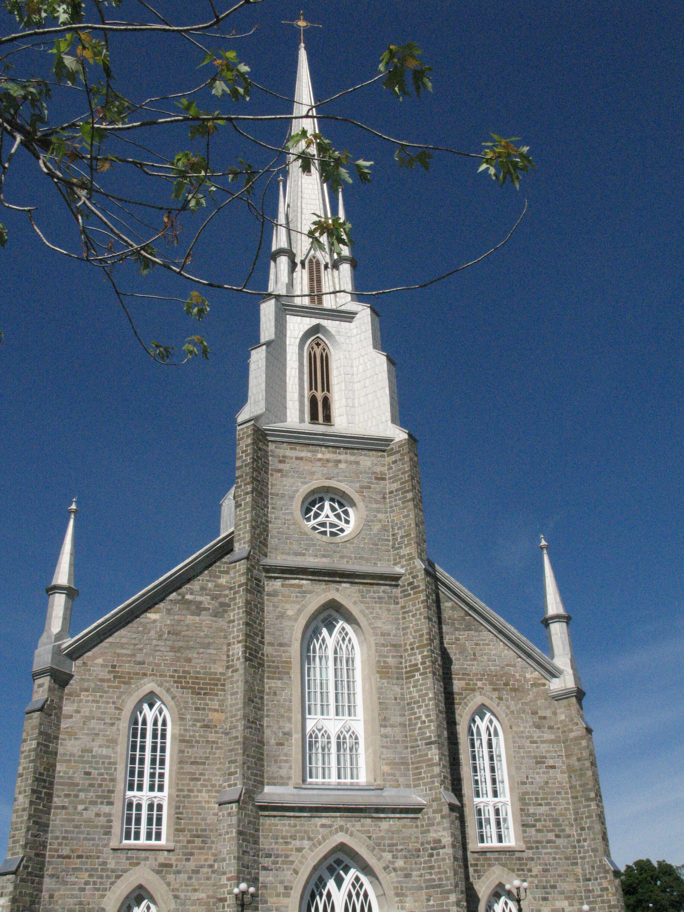 L'Église catholique Saint-Patrice, dans le quartier Fraserville de Rivière-du-Loup, (Québec). L'église a été construite en 1855-1856.